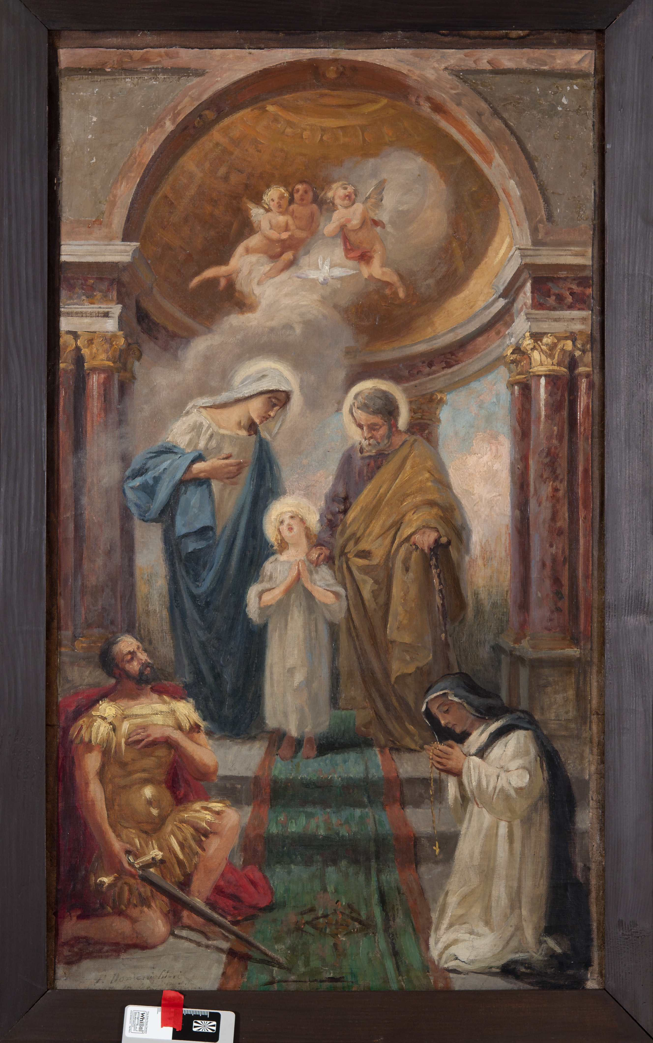 Il bozzetto, conservato presso il Museo Camuno di Breno, si discosta poco dalla pala dell'altare maggiore, realizzata nel 1915 dall'artista brenese Francesco Domenighini